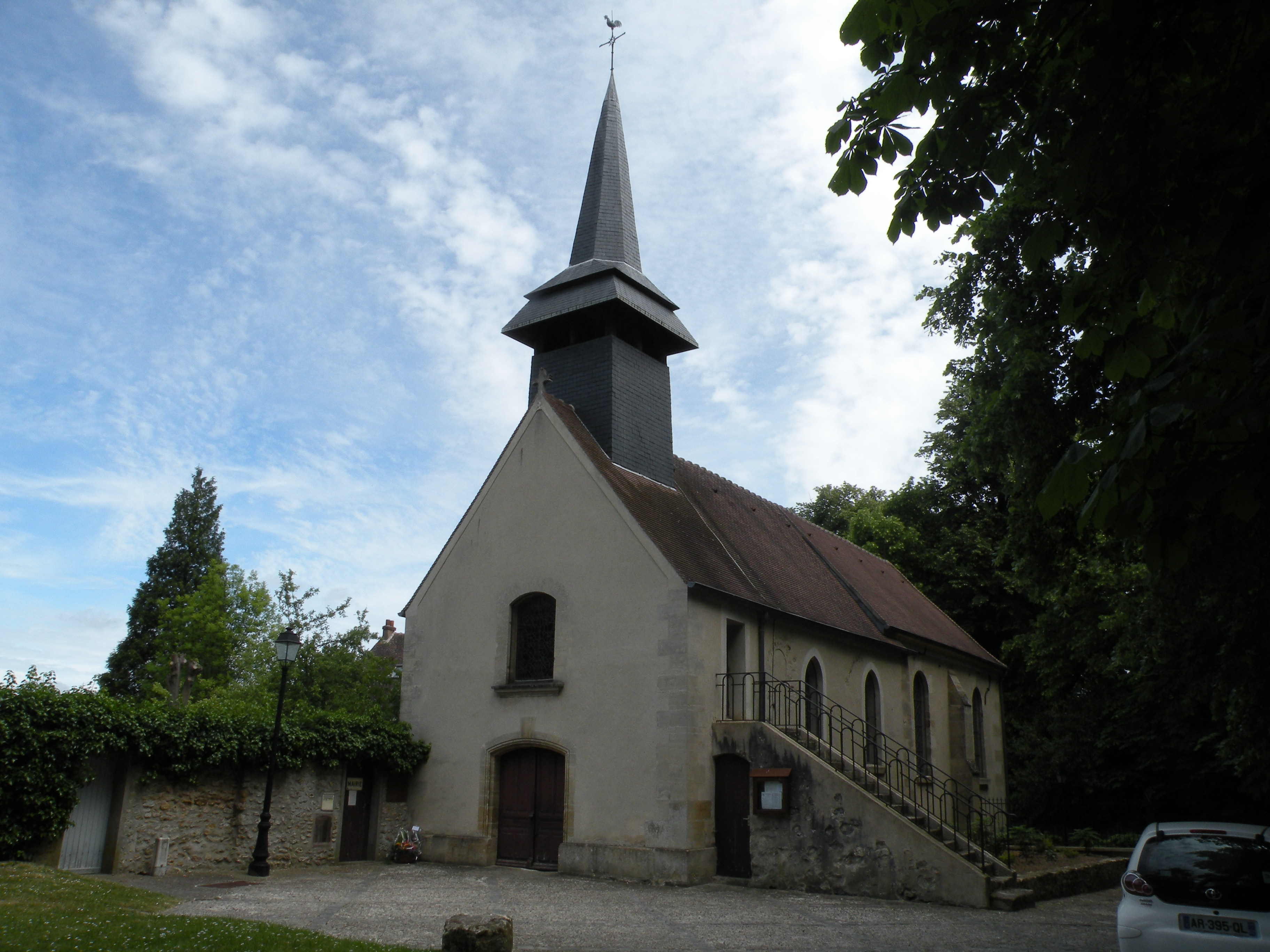 église de Boisemont (Val-d'Oise)